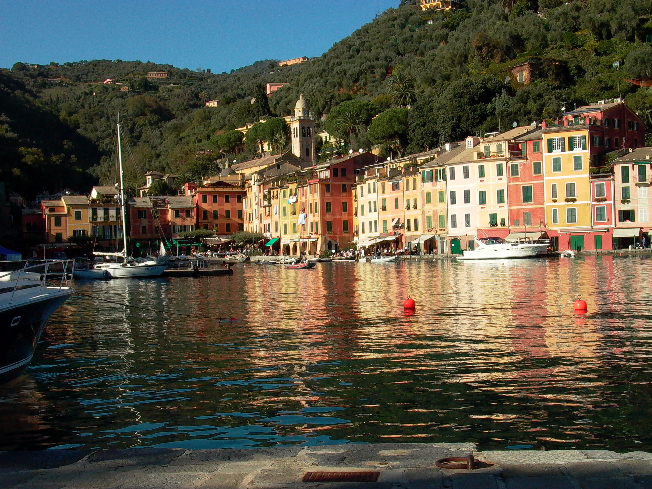 Colori di Portofino